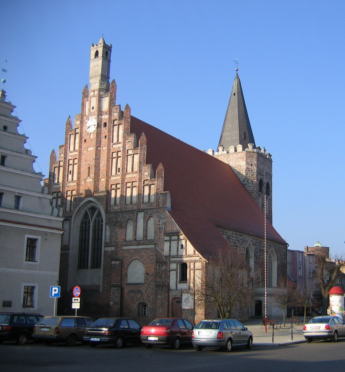 Lubsko, kościół par. p.w. Nawiedzenia NMP (dec. p.w. Najśw. Serca Jezusa), 1 poł. XIII, XIV/XV